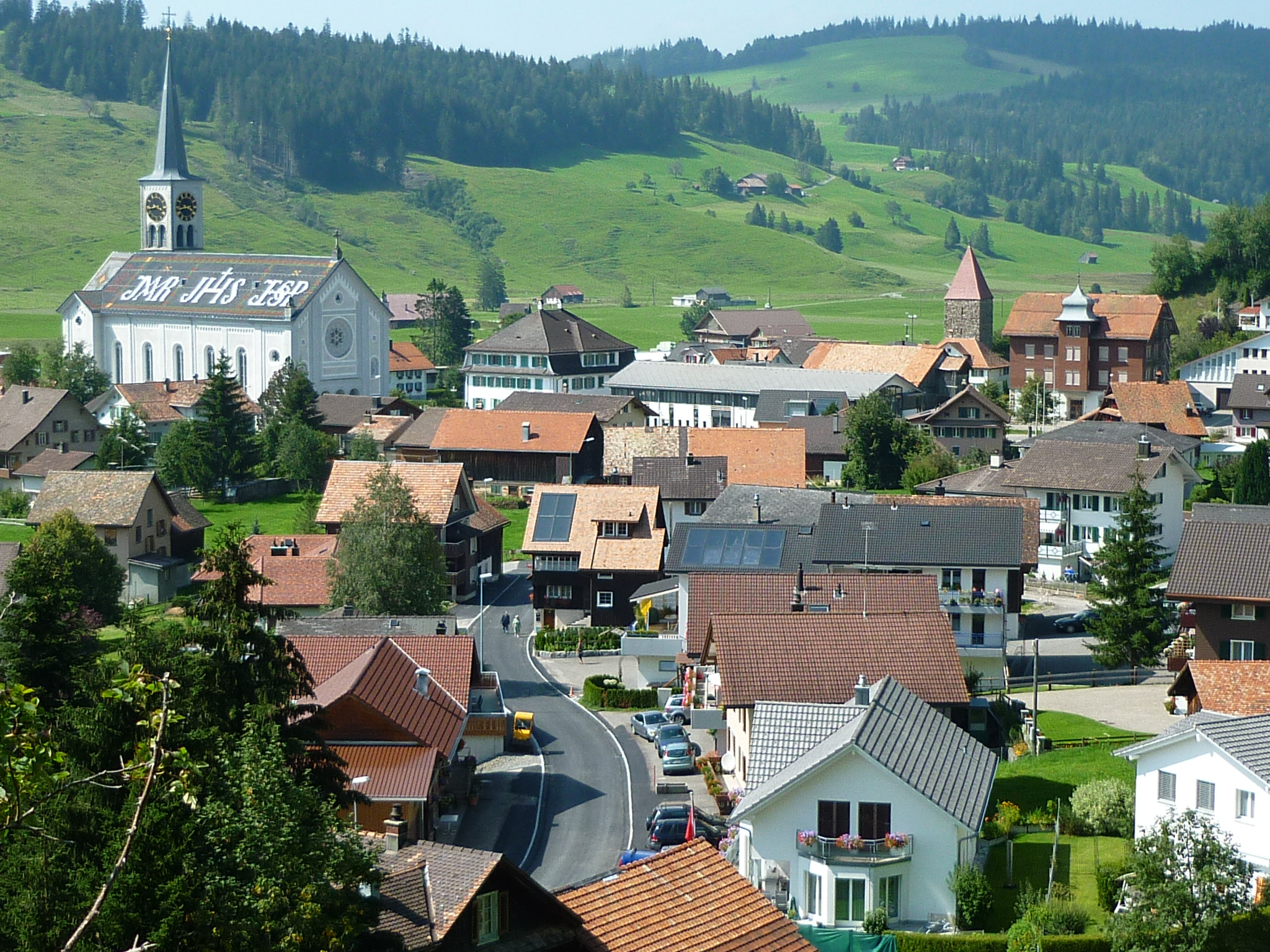 Rothenthurm SZ, Schweiz